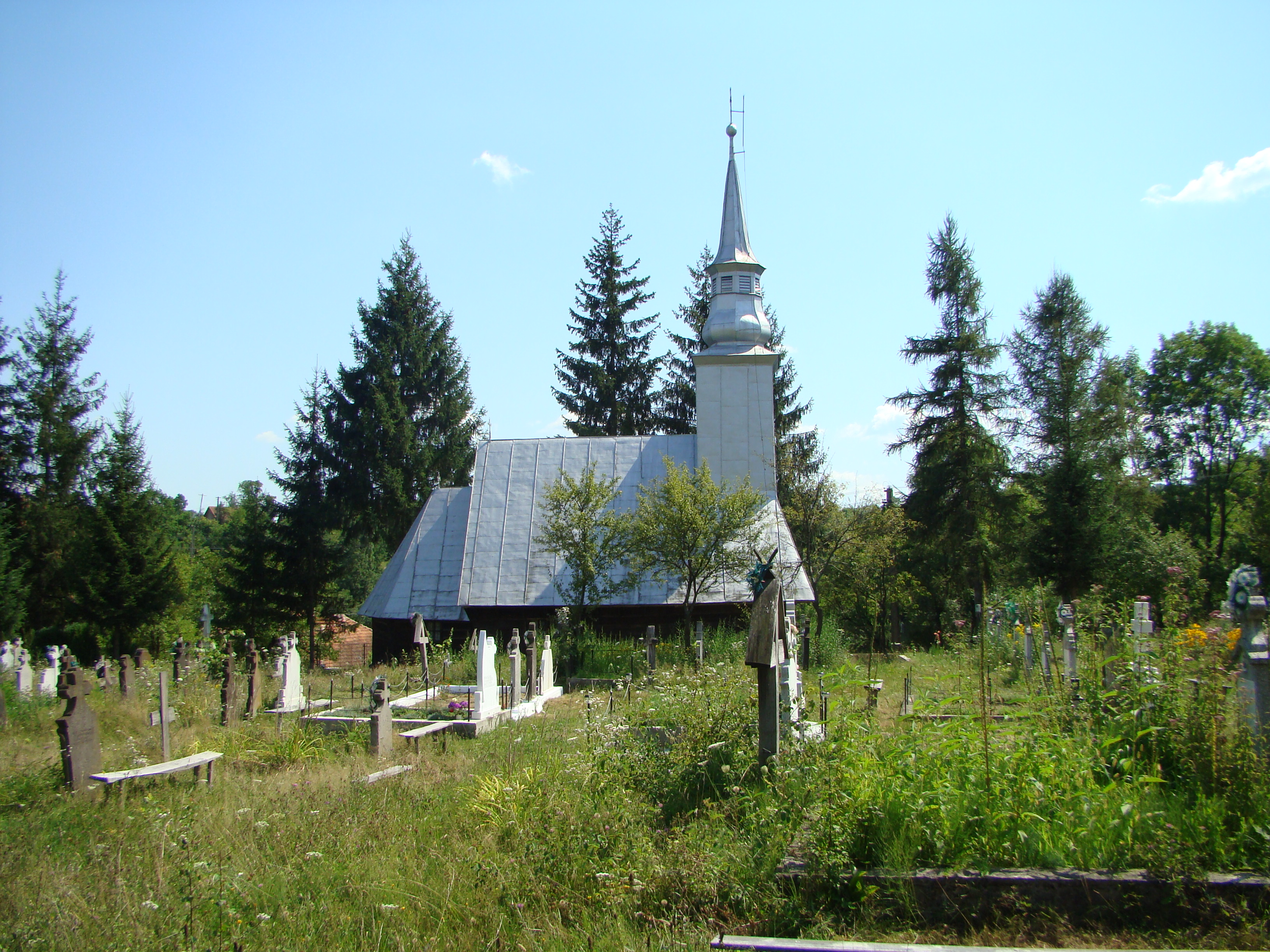 Biserica de lemn din Tisa-Arad